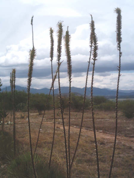 Quiotes de lechuguilla en el camino de acceso a la Zona Arqueológica de Tula (Hidalgo)